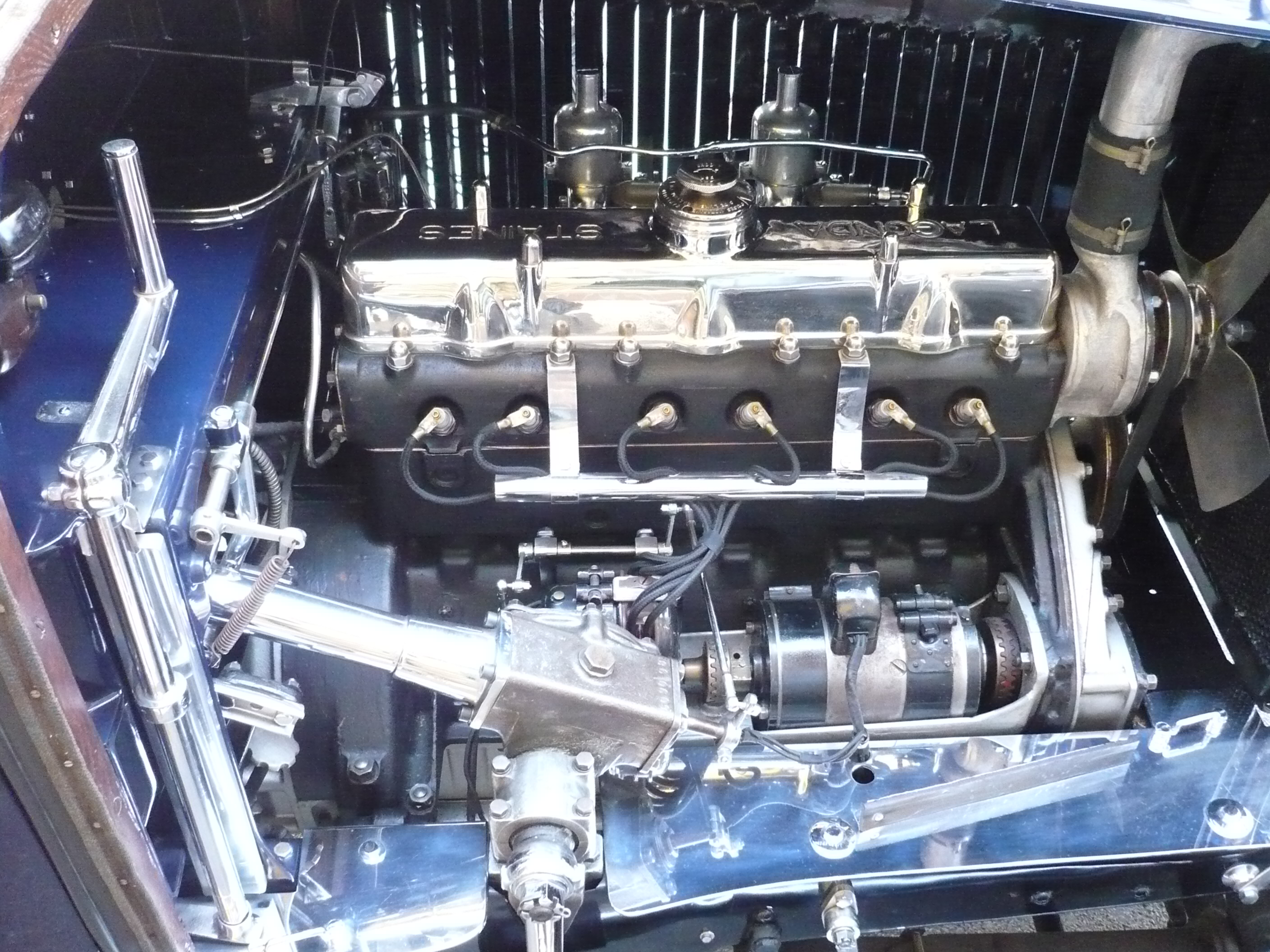 Lagonda 16 80 berlina carrozzata Weimann, prodotta nel 1928 con una prima immatricolazione nel 1932, successivamente immatricolata in Italia nel 1967. Auto iscritta all'ASI n.0574 nel 1971. Motore 6 cilindri in linea di 2.000 di cilindrata; catteratteristici i parafanghi a “motociclista”.